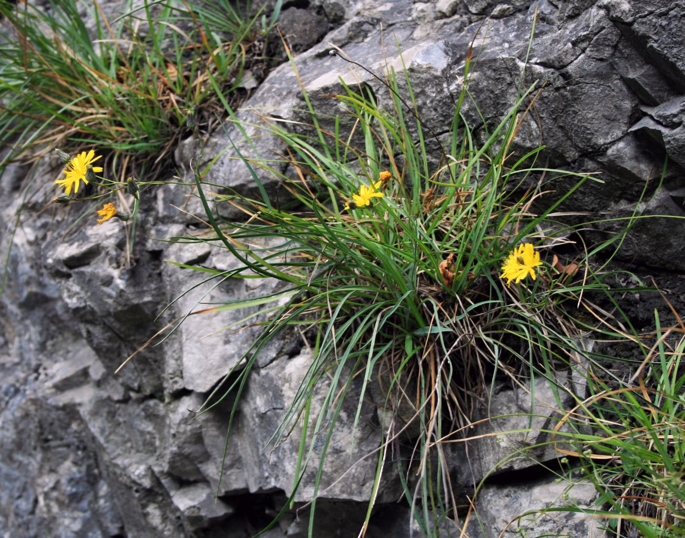 Lauch-Habichtskraut (Hieracium porrifolium), Korbblütler (Asteraceae) – Österreich/Austria/Autriche: Steiermark, Grazer Bergland, Weizklamm 6–7 km NNW Weiz